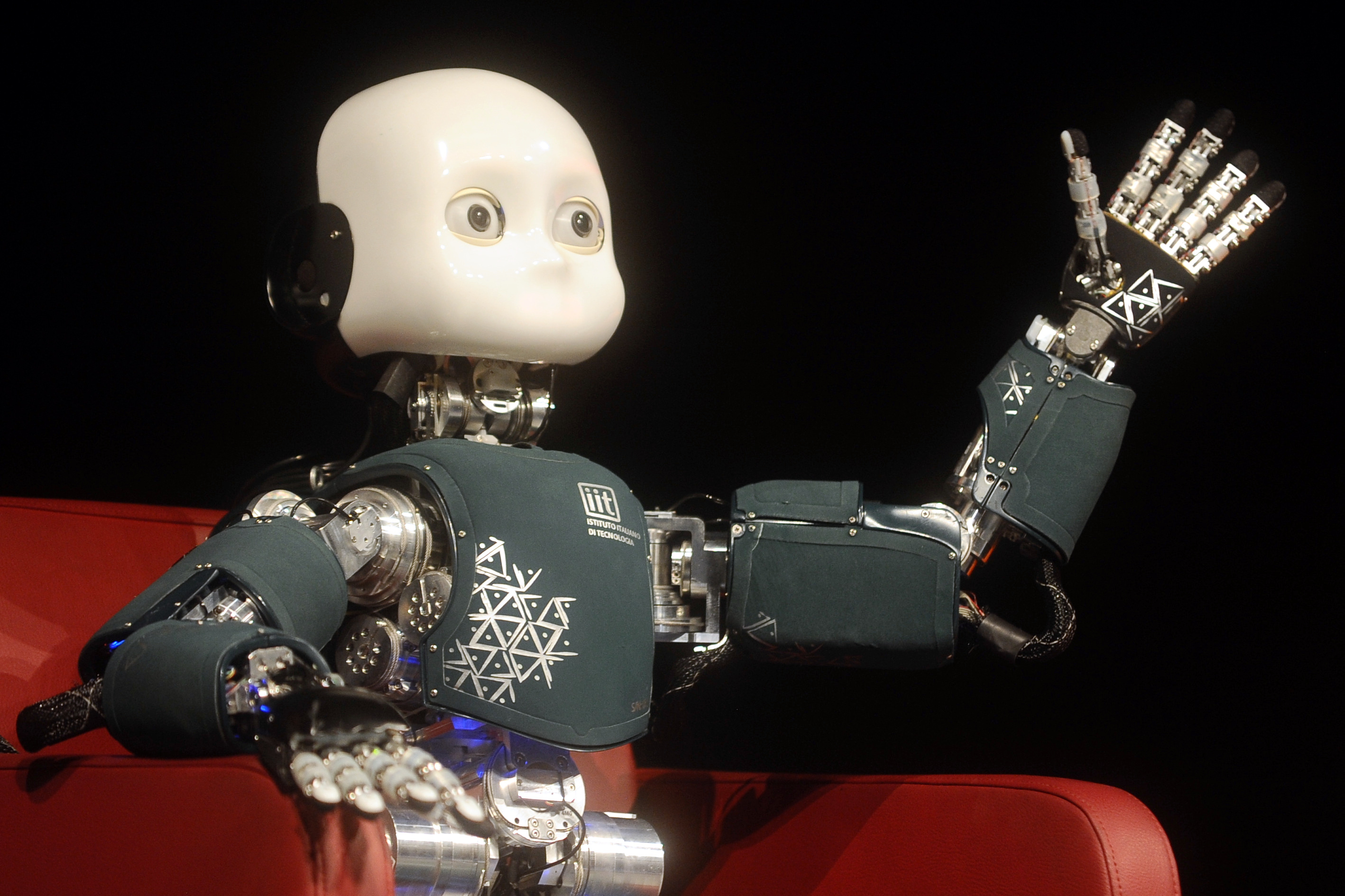 ICub al Festival dell'Economia di Trento.